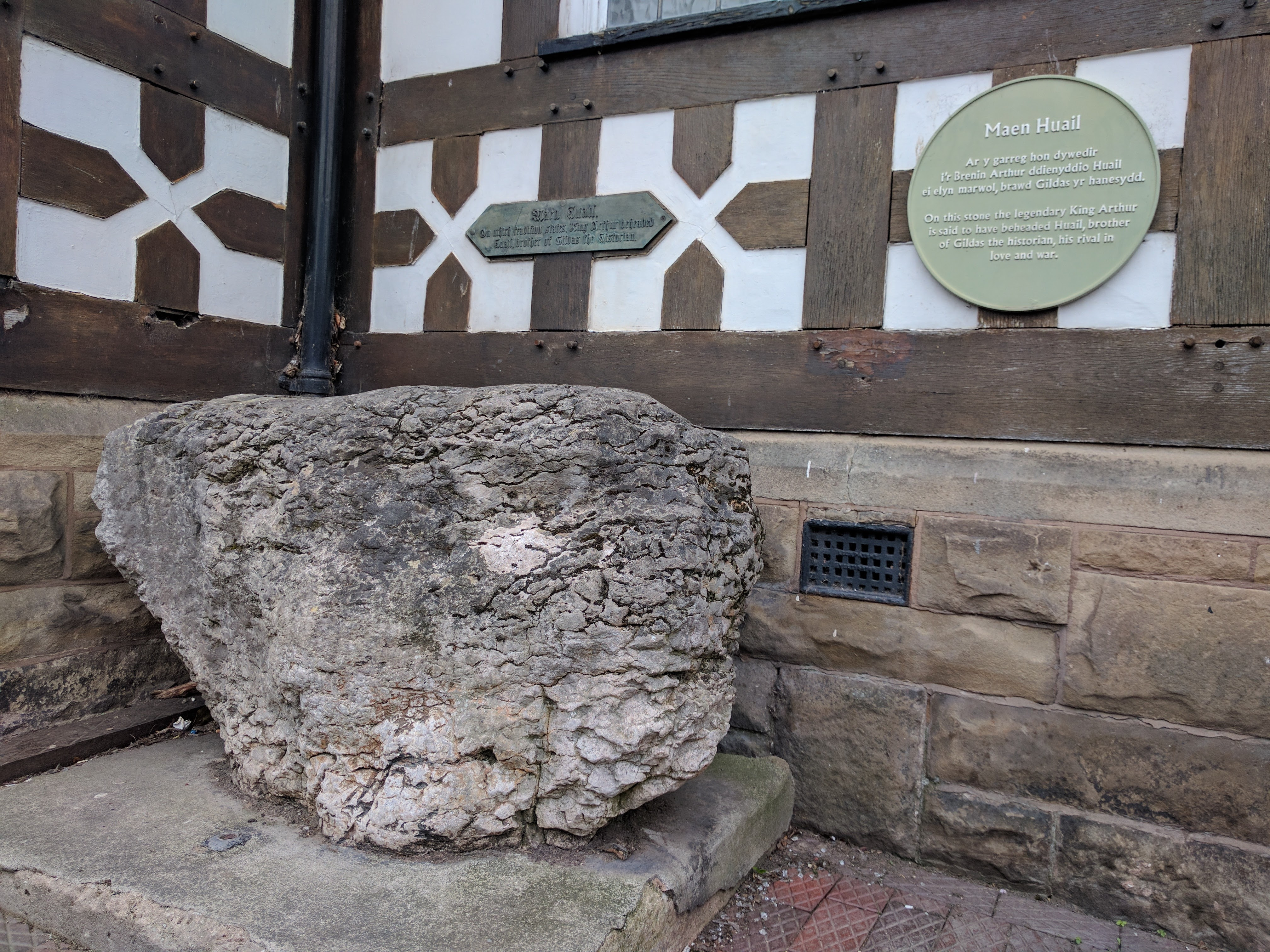 Maen Huail, y garreg ble y credir i'r Brenin Arthur ddienyddio Huain, brawd Gildas